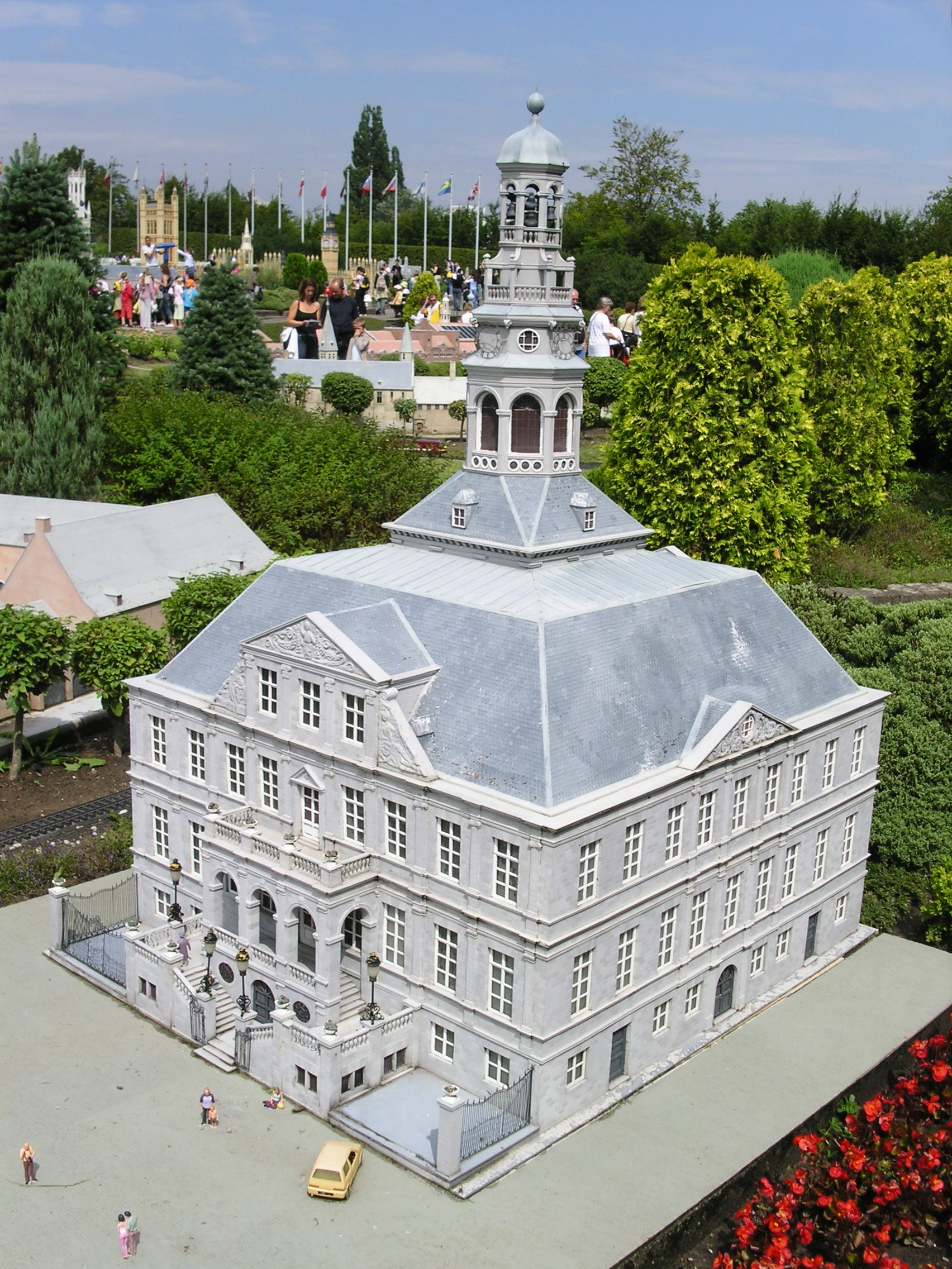 Model Maastrichtské radnice.